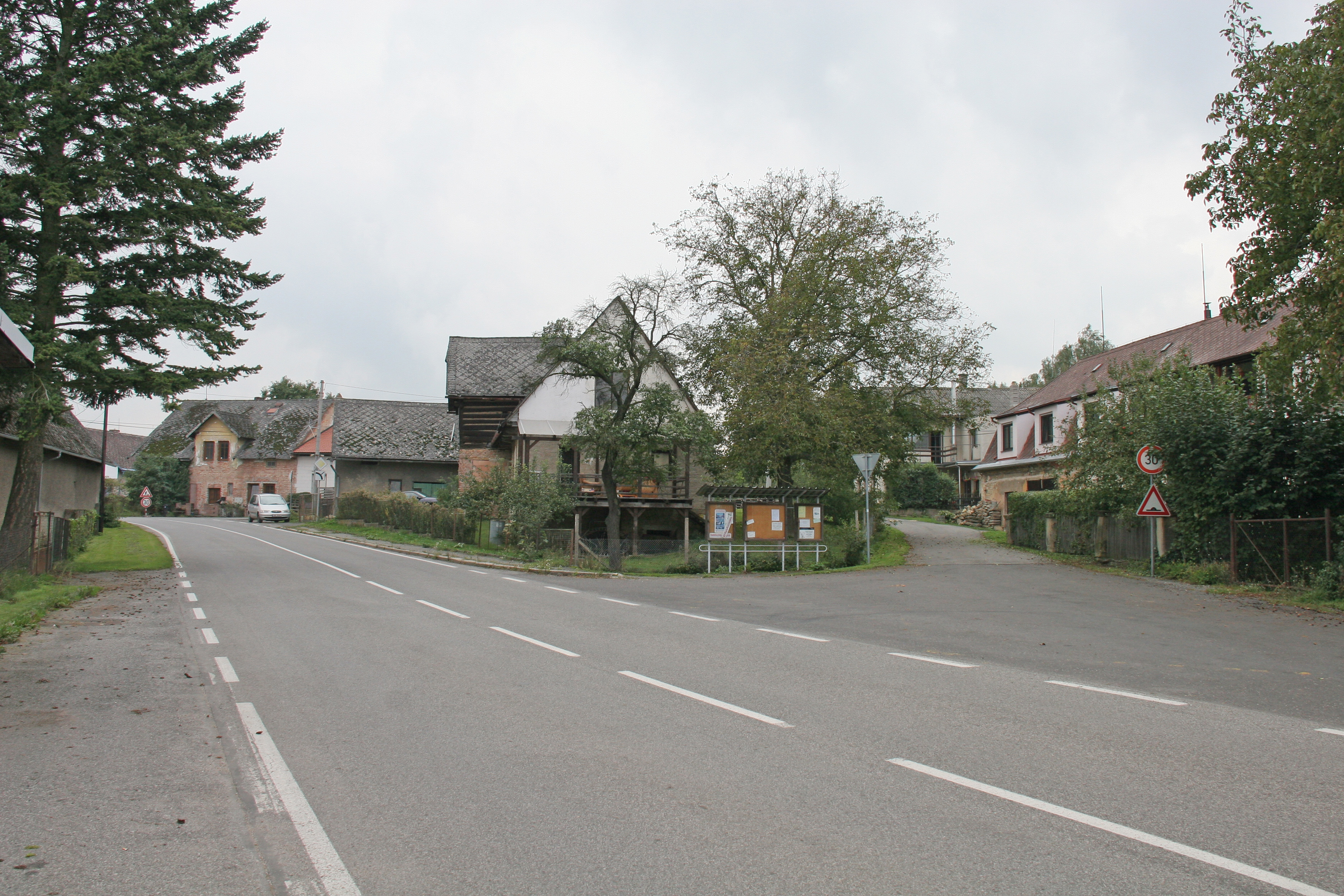 Velká Bukovina čp. 25